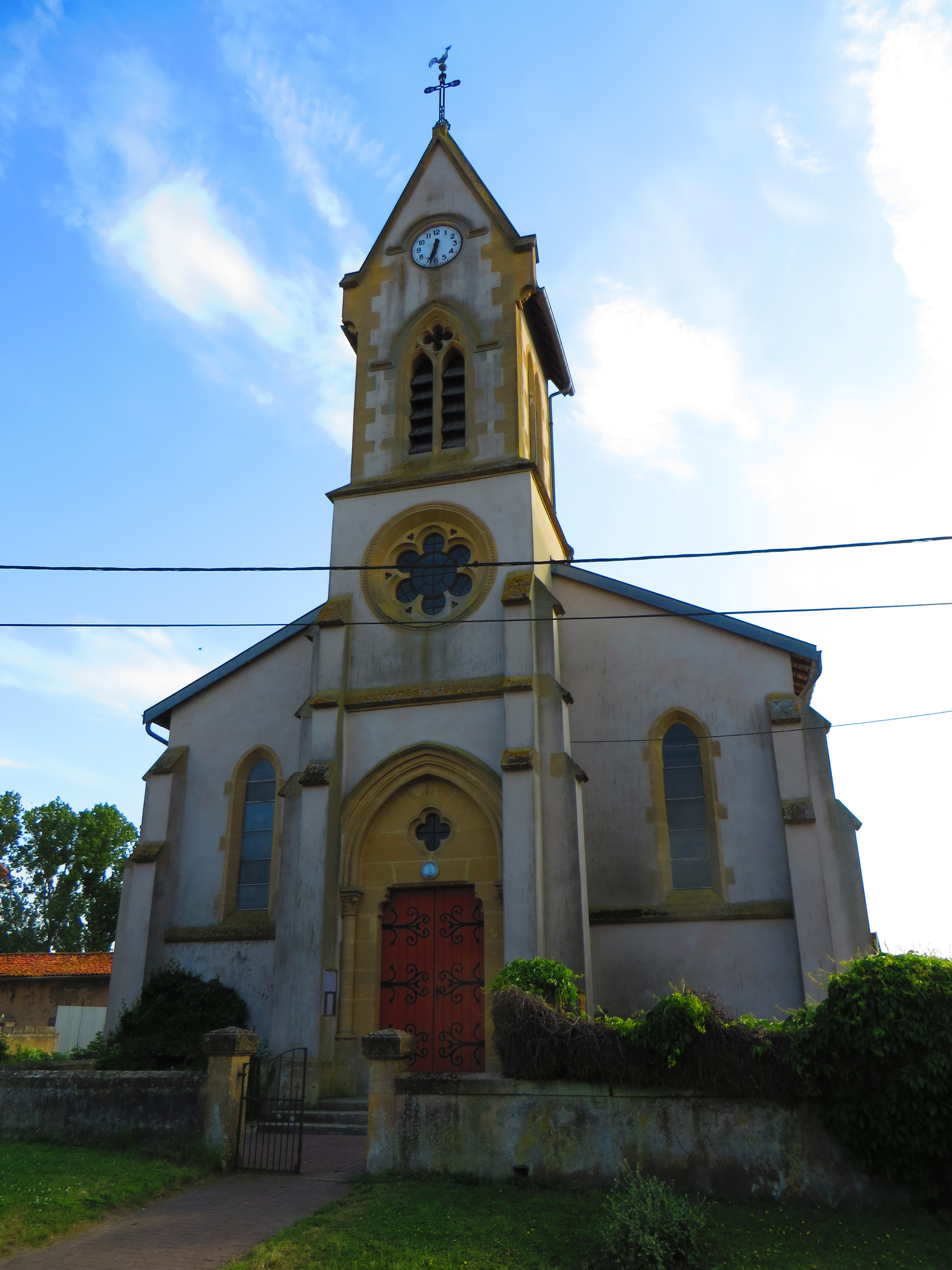 Han Nied eglise